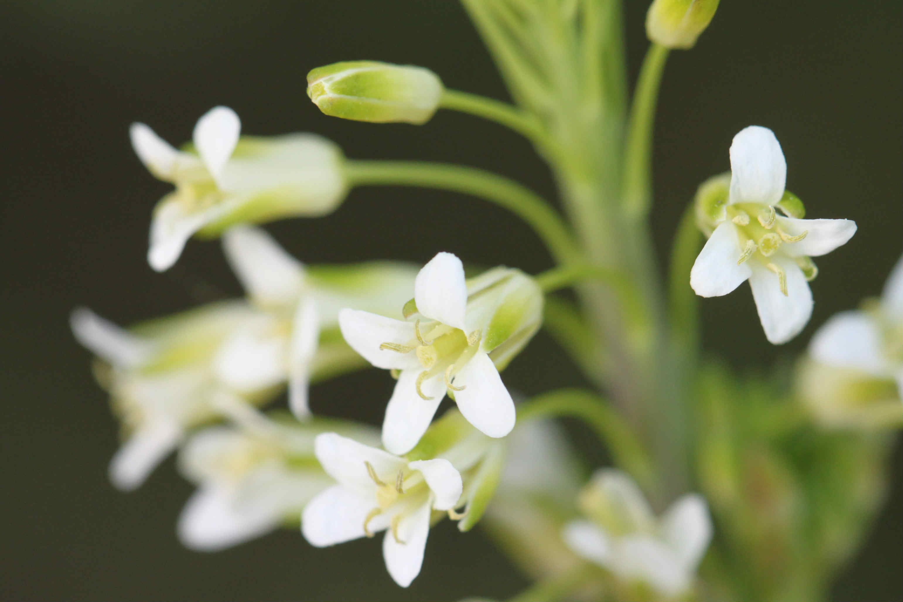 Turmkraut (Turritis glabra) in der Schwetzinger Hardt, 9.5.2017